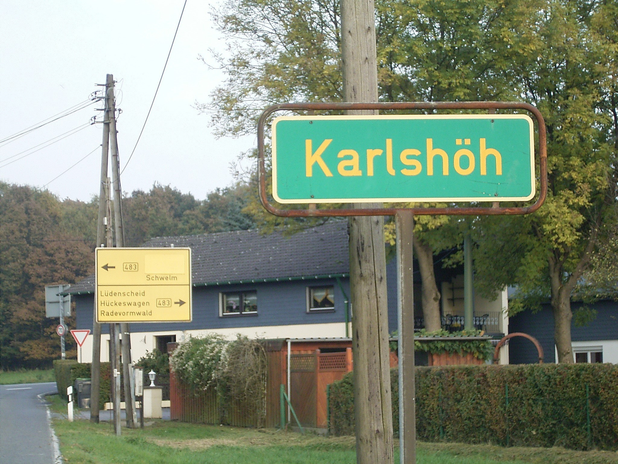 Radevormwald